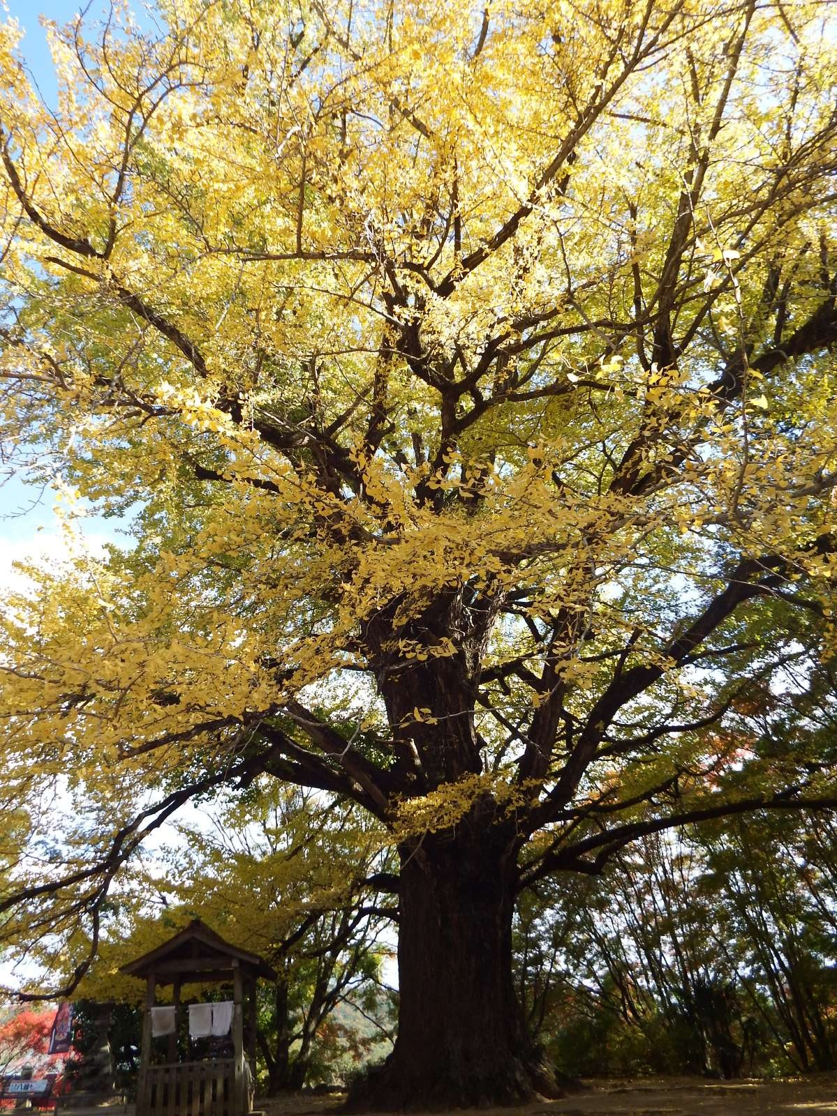 大山寺の大銀杏